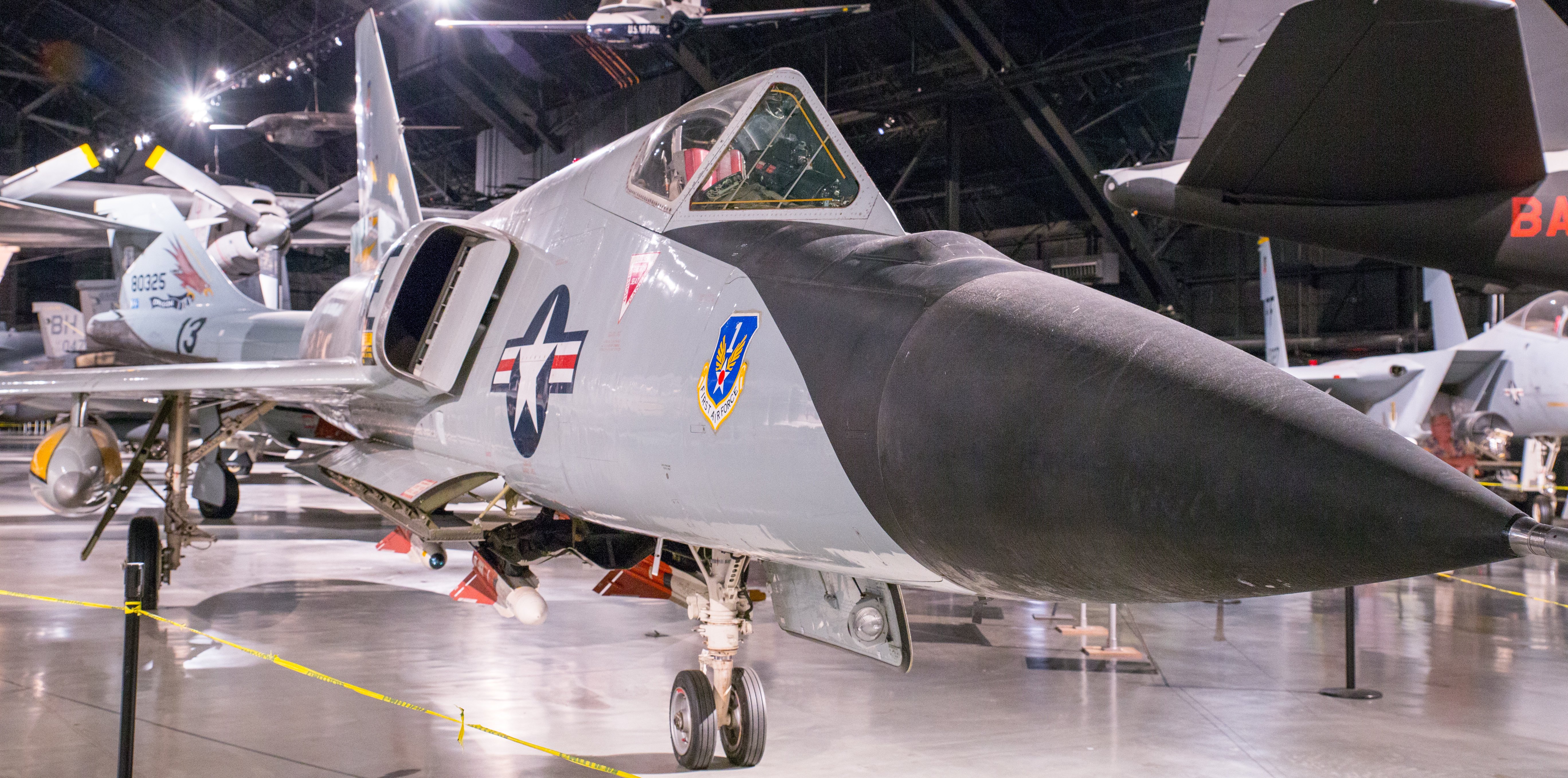 Convair F-106 Delta Dart